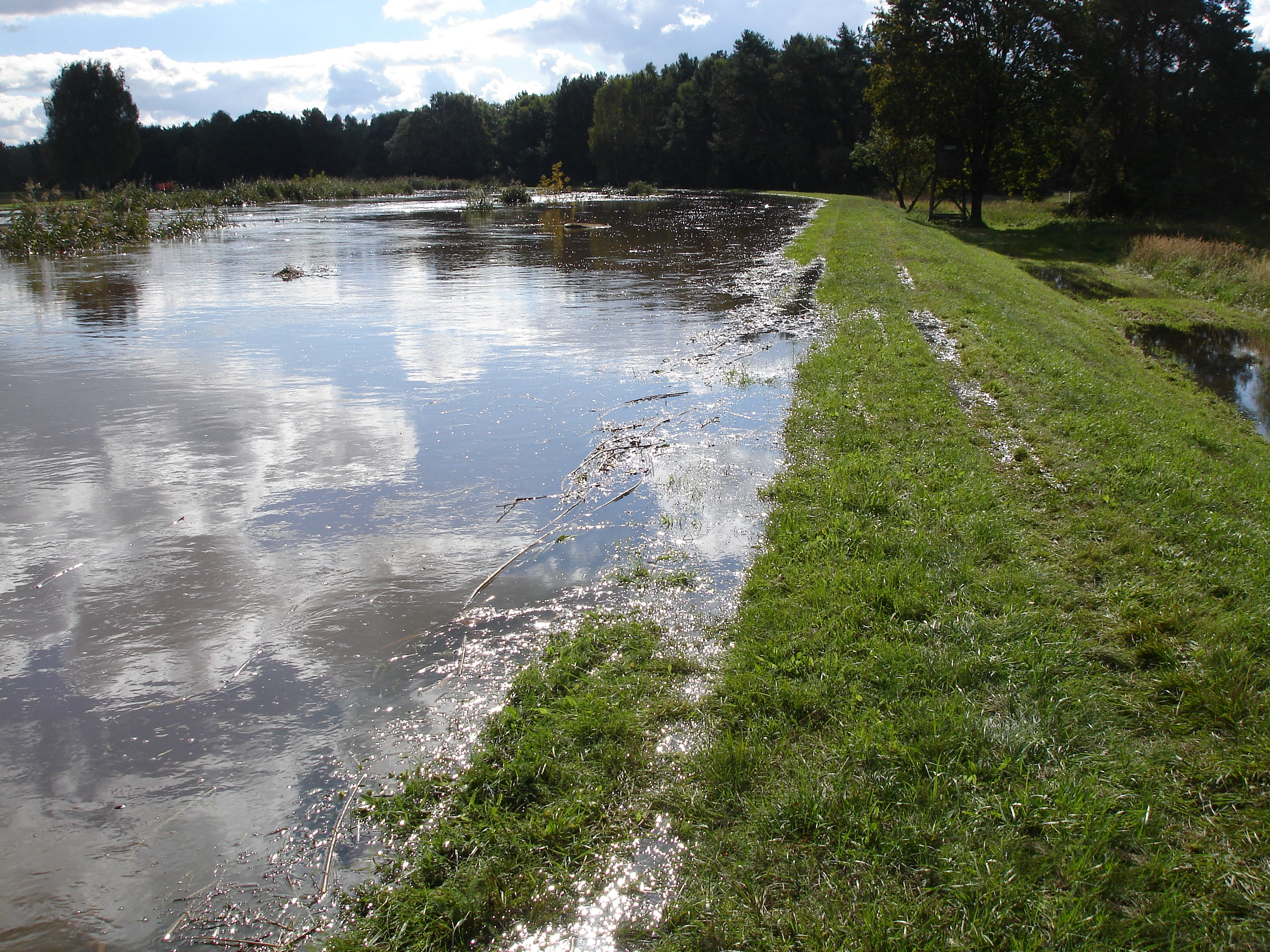 Deichüberströmung